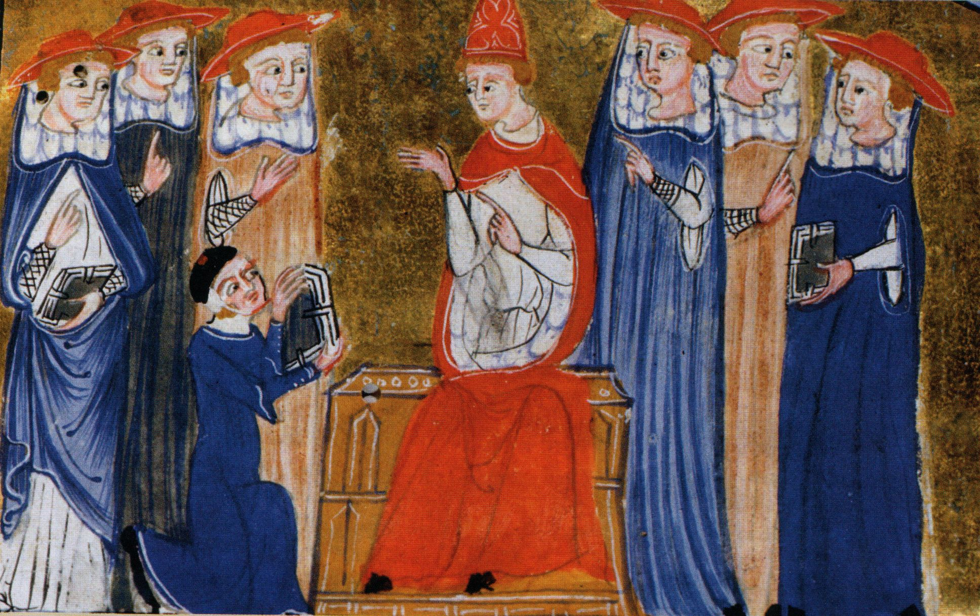 Jean XXII reçoit les transcriptions de l'interrogatoire de Gui de Corvo. Manuscrit du XVem siècle. Bibl Nazionale Braidense, Milan, Italie.